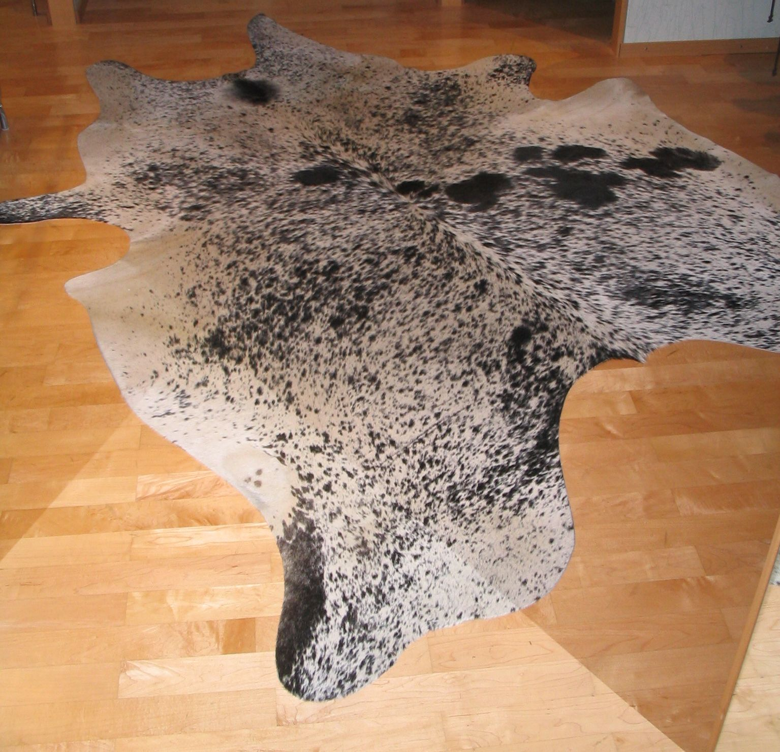 Rinderfell Gesehen bei Firma CHR. SCHAD PELZ UND LEDER, Ludwigshafen